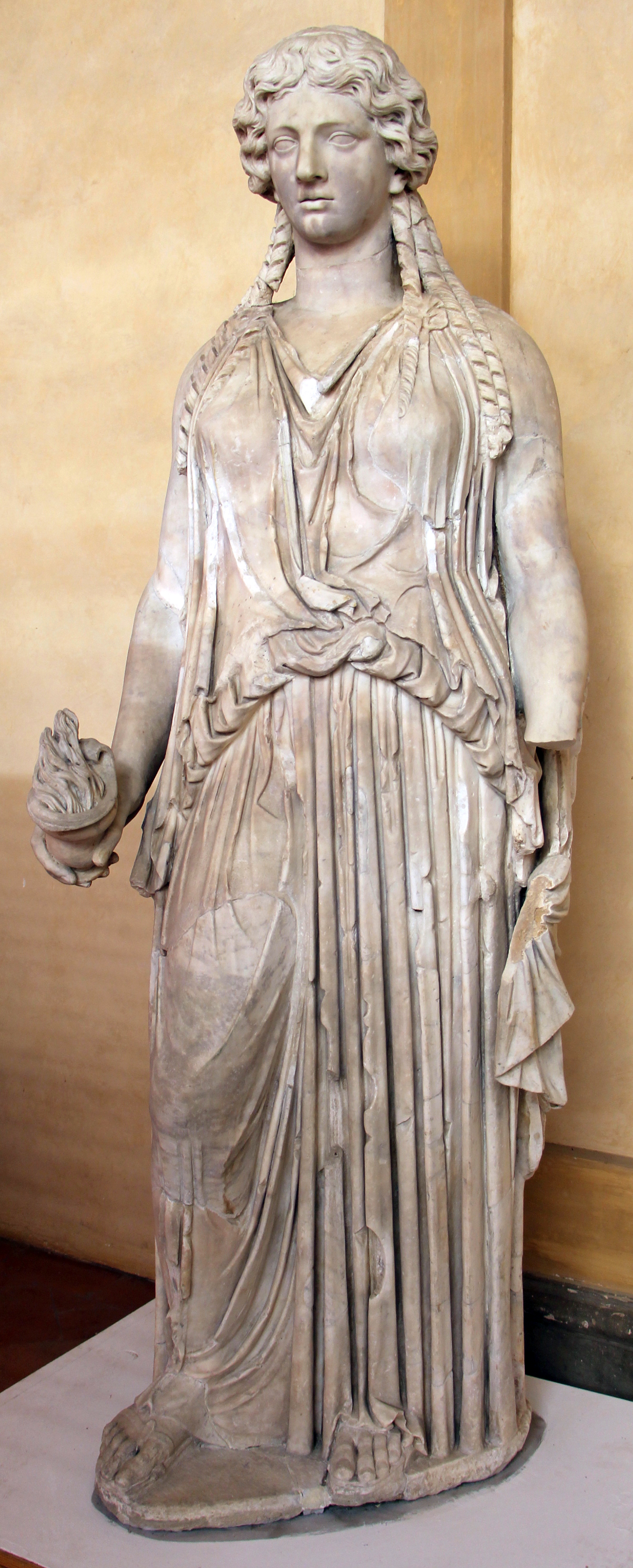 Villa Corsini a Castello - MIBAC This is a photo of a monument which is part of cultural heritage of Italy.